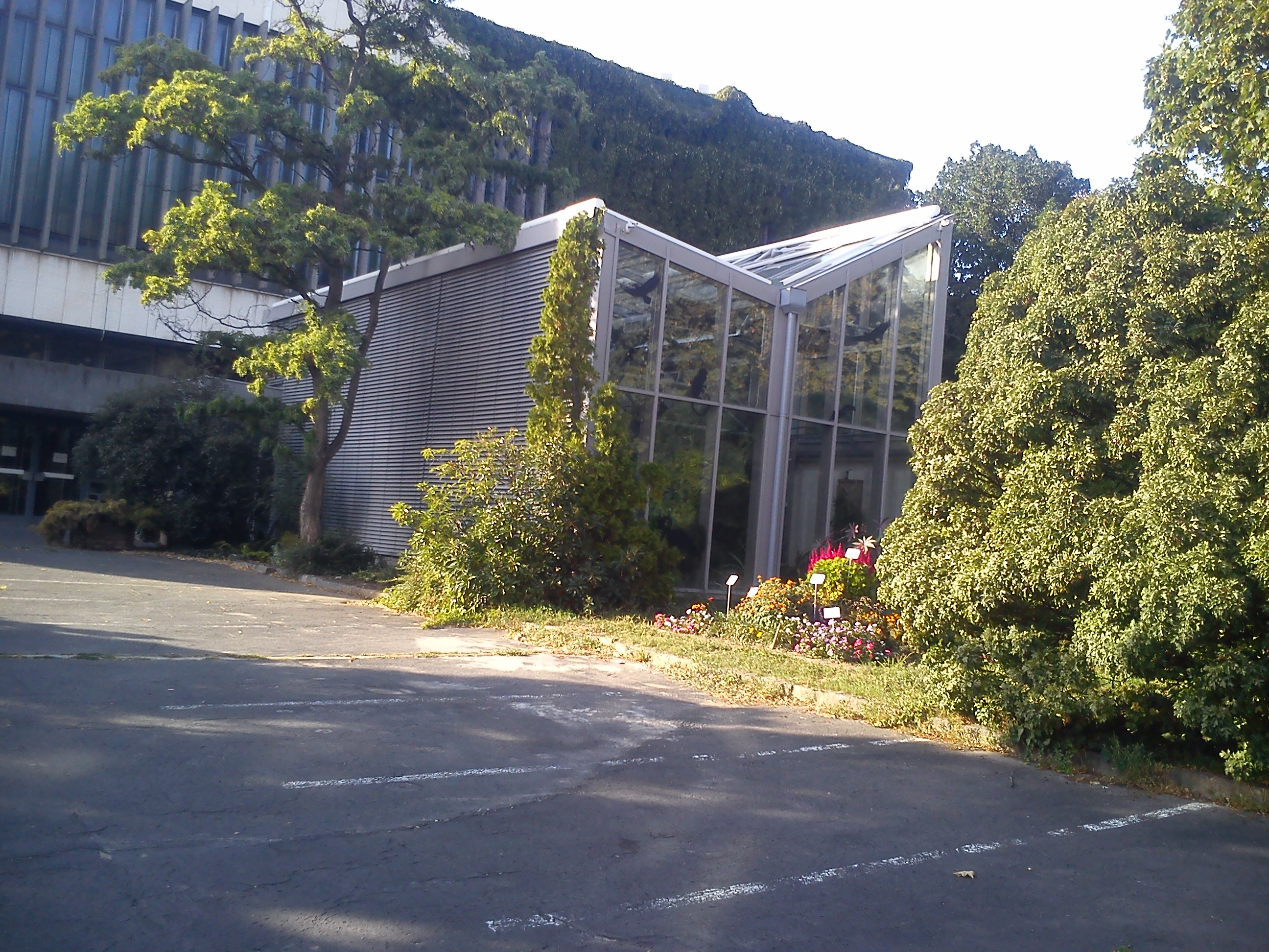 Gyönyörű növényeket termesztenek benne. This is a photo of a monument in Hungary, Identifier: 90005